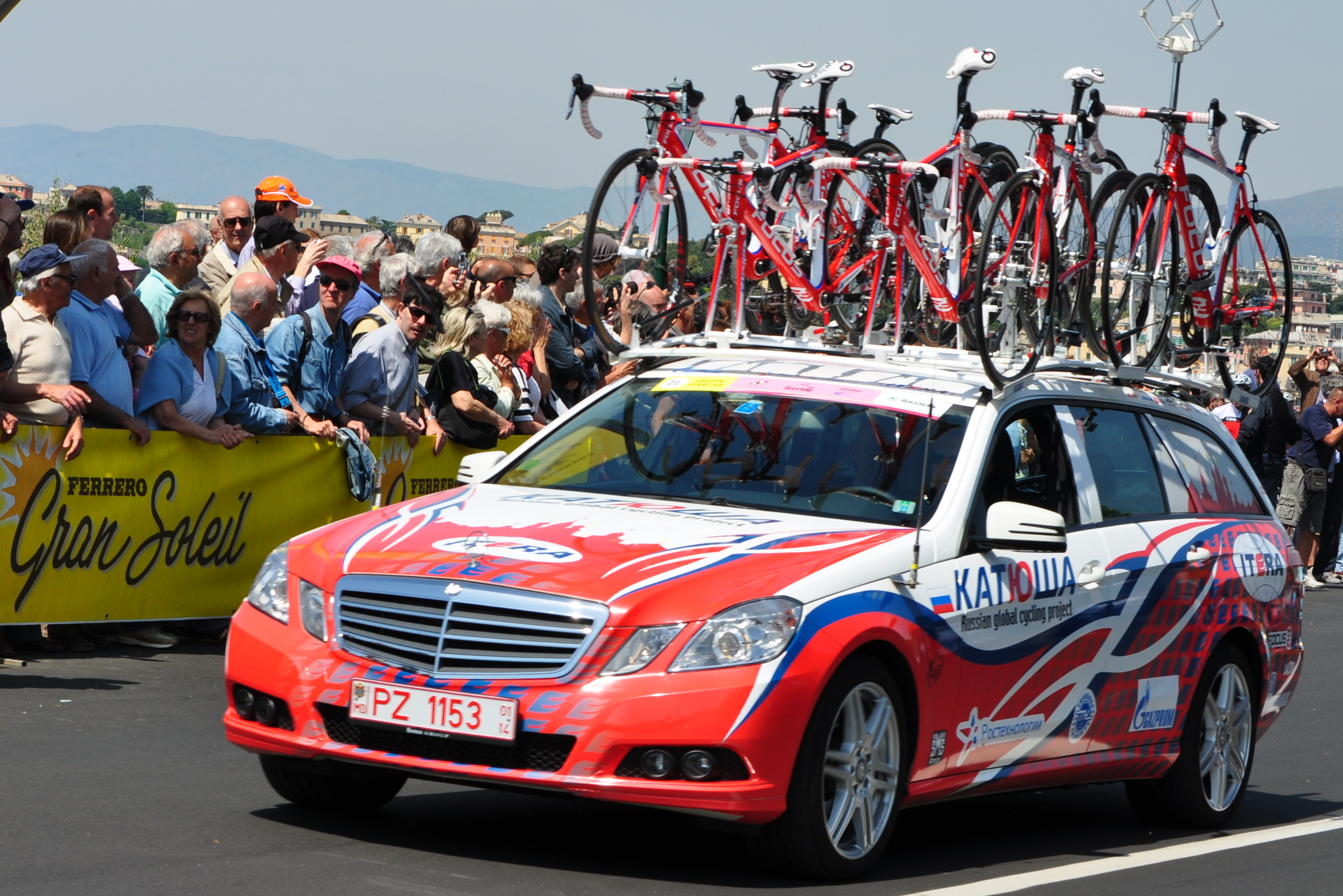 L'ammiraglia del Team Katiowa durante la 4a Tappa del Giro d'Italia 2011